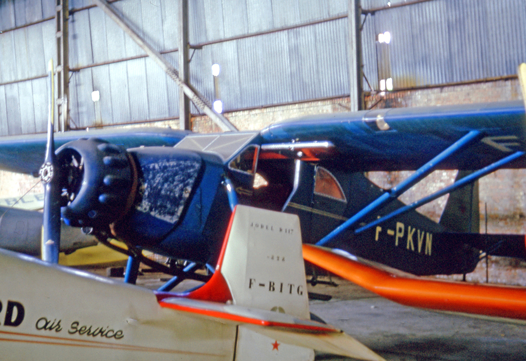 Salmson D-211 Super Phrygane F-PKVN at Lille Lesquin airfield in 1965